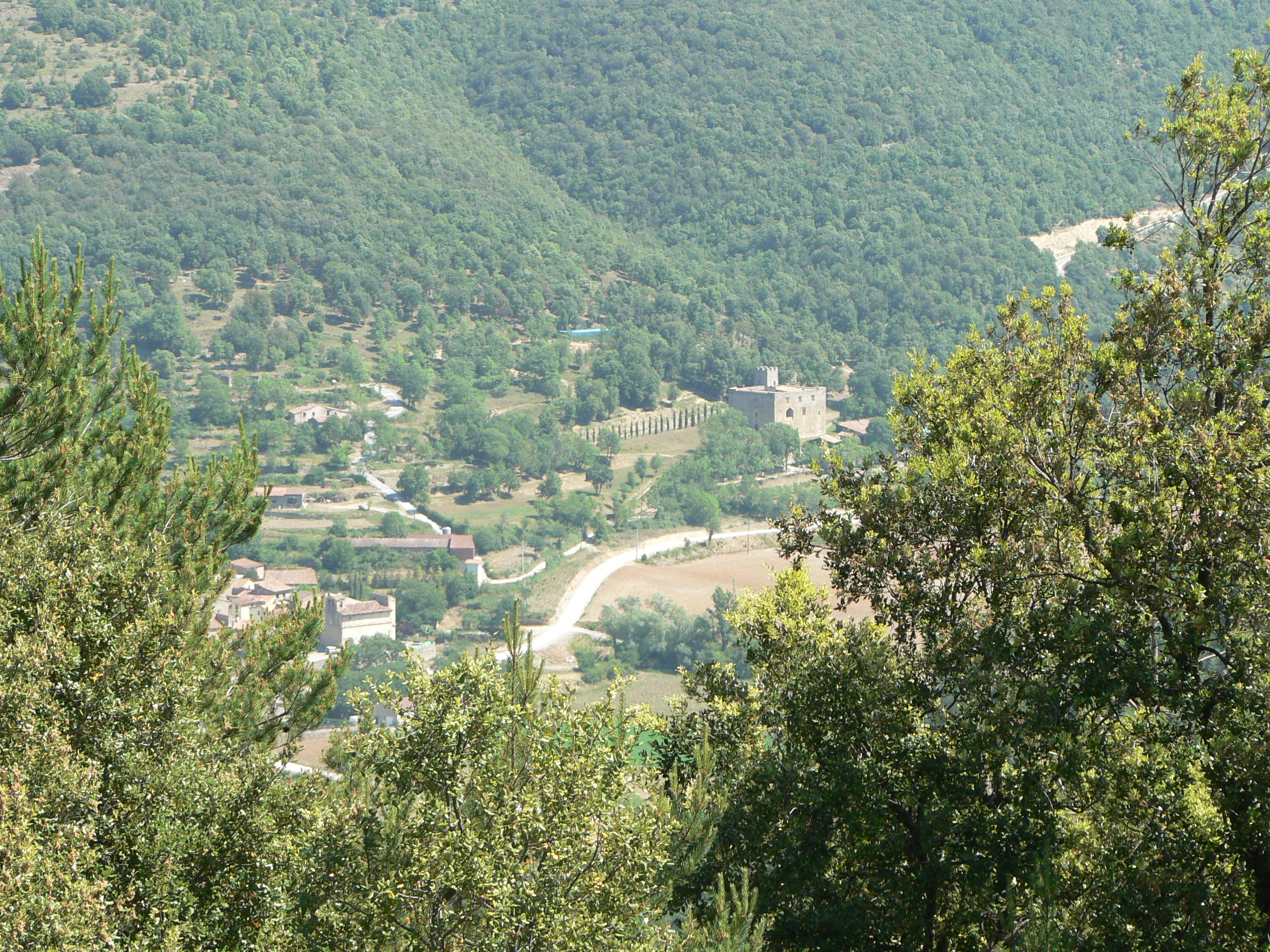 Oix